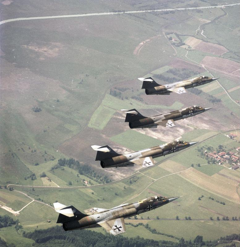 Reportage Bundeswehr: JG 74 (Jagdgeschwader)